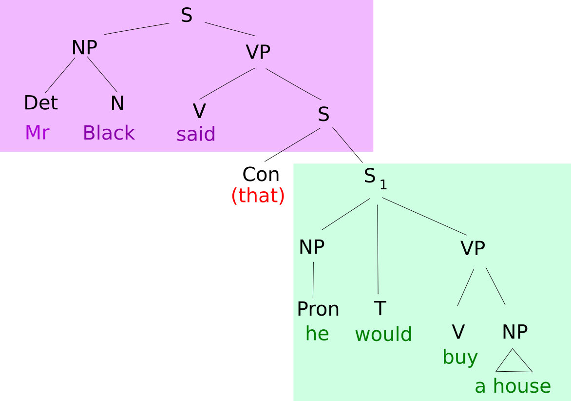 Zdanie podrzędne na drzewie sklądniowym